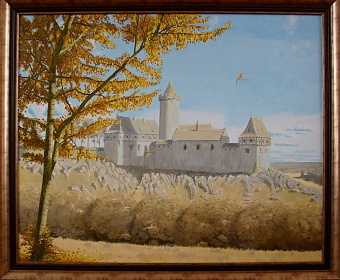 Hrad Dobronice, olej na plátně 108x87 cm